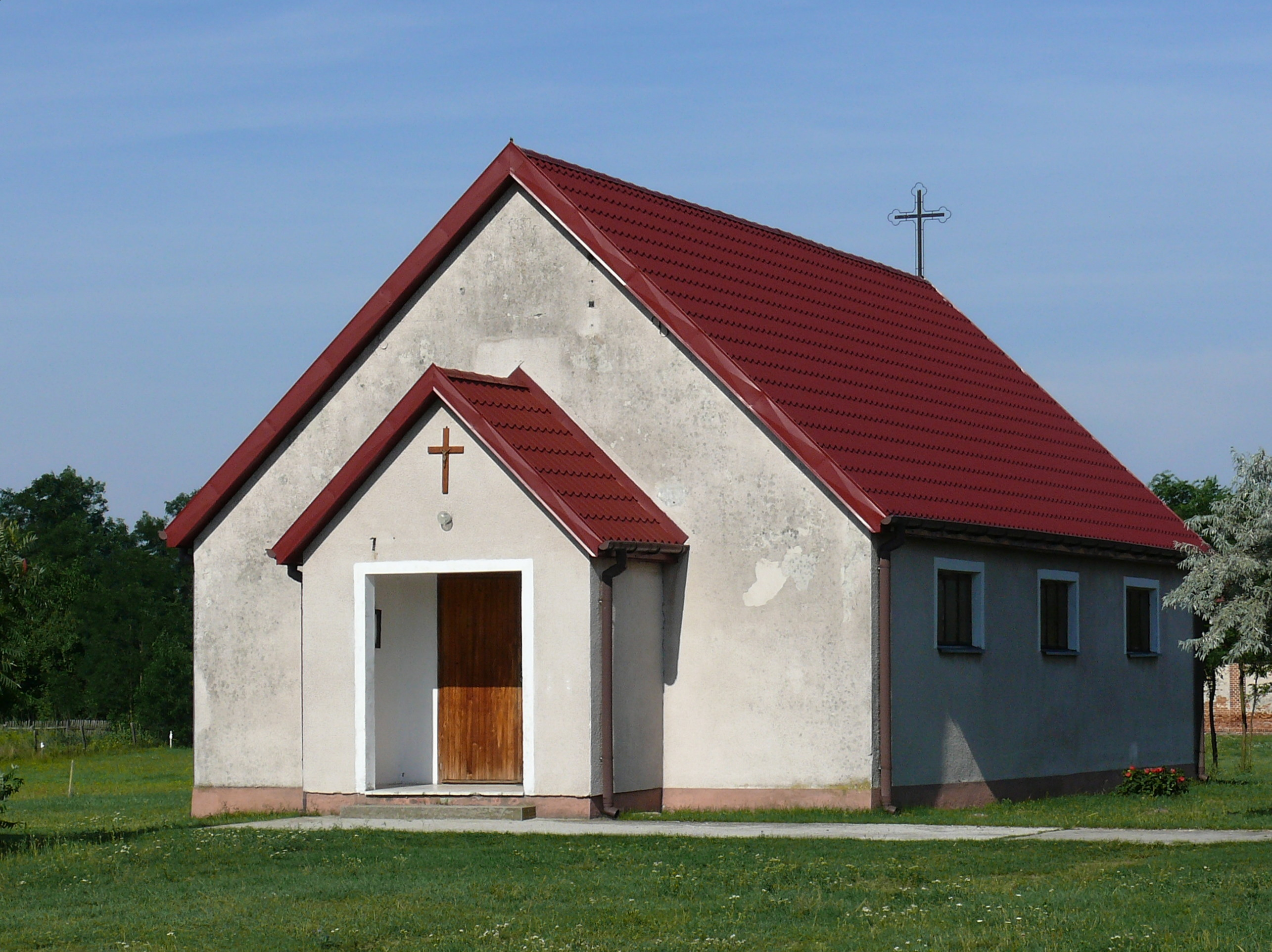 kościół filialny w Trzęśniewie - parafia Kościelec Kolski